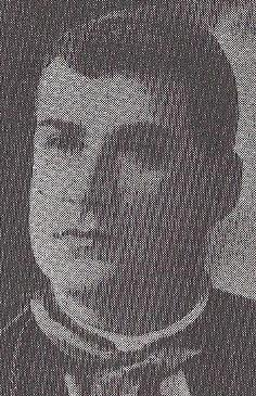 Bispo Alberto José Gonçalves, primeiro Bispo paranaense e primeiro da Diocese de Ribeirão Preto